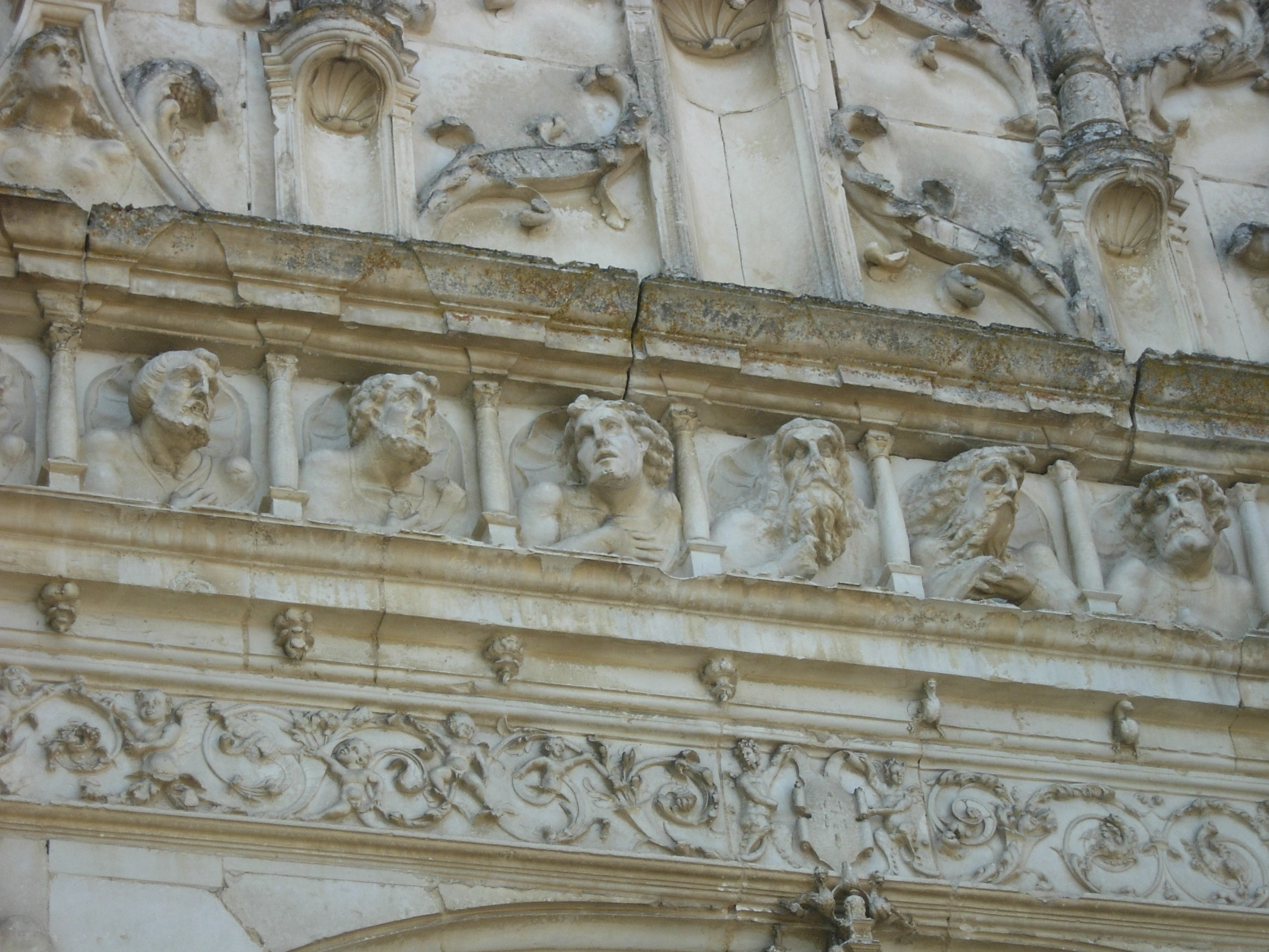 Eglise d'Auxon Aube